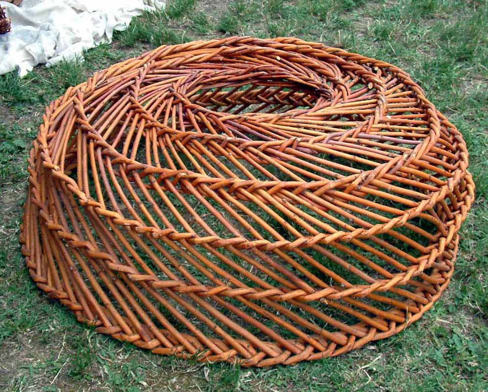 La crèna è una cesta rotonda aperta in alto. Questa Crèna serviva un tempo in Romagna per allevare i pulcini in compagnia della chioccia.